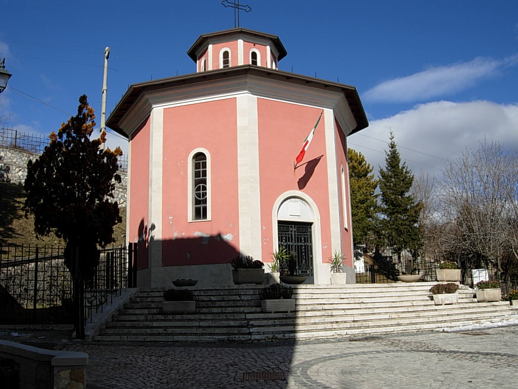 Il mausoleo dei caduti di Pietransieri Foto personale